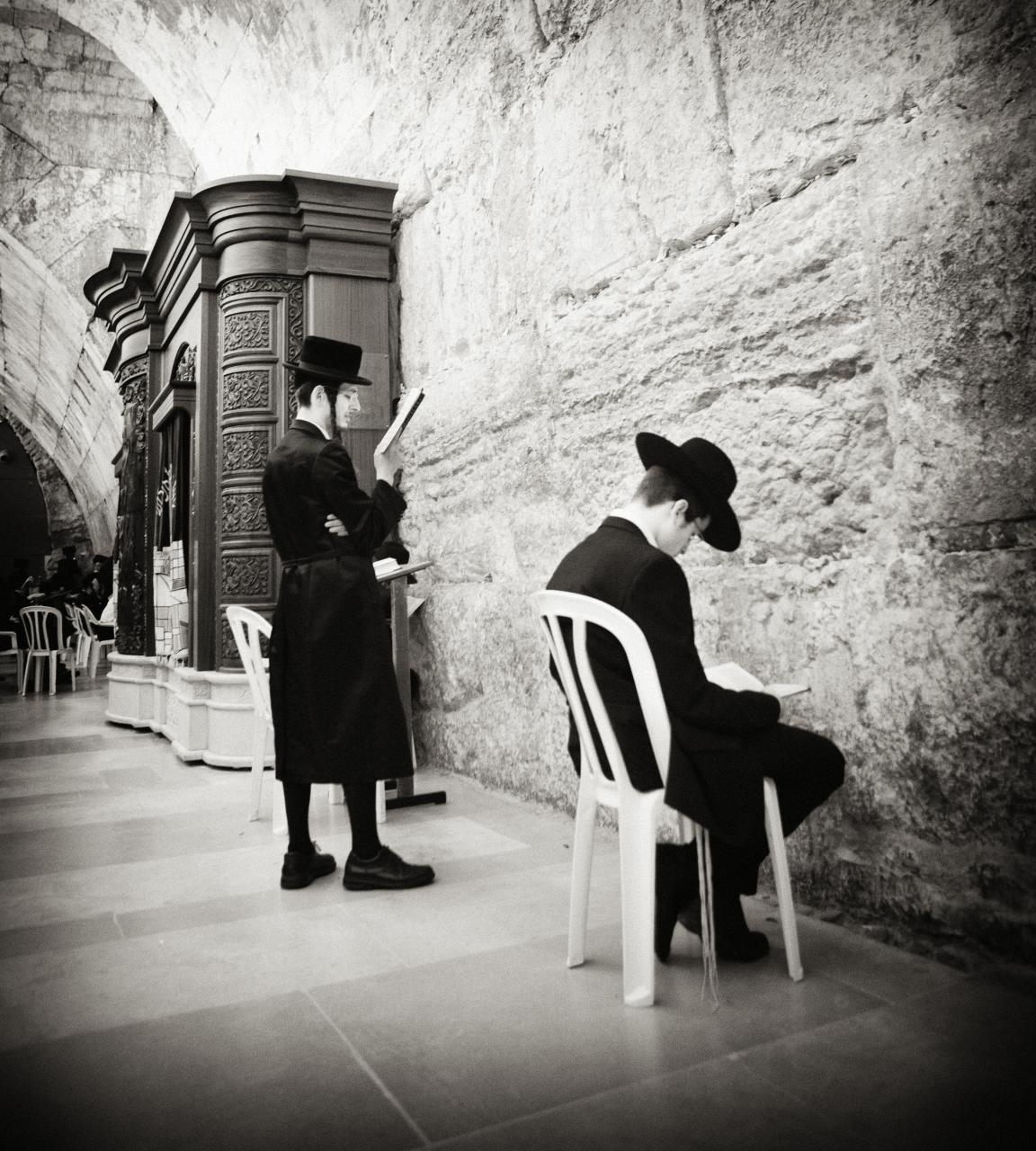 Iddewiaeth Hasidig yn gweddïo wrth Fur yr Wylofain yng Nghaersalem